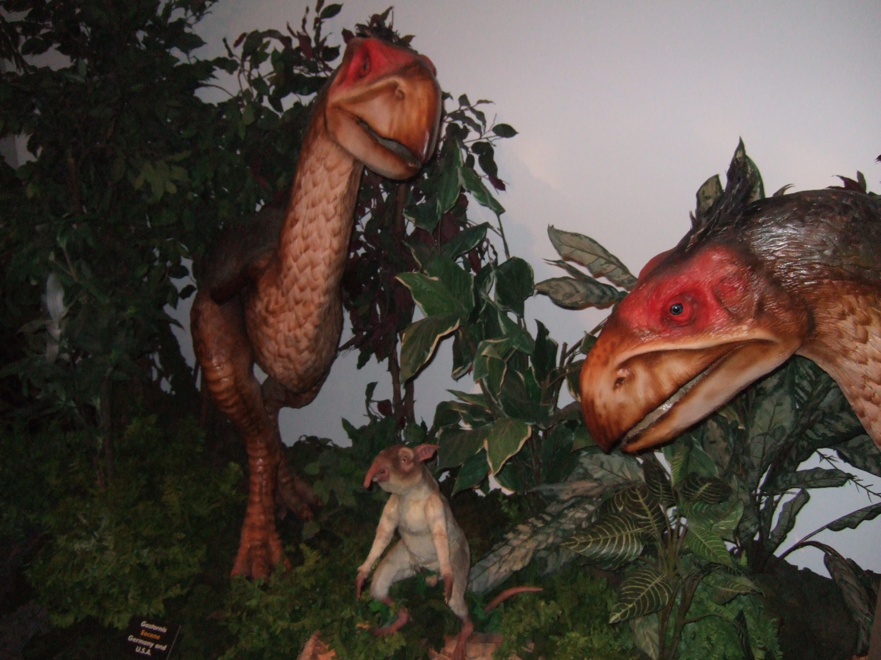 Big birds